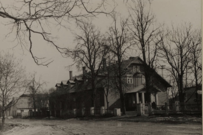 Jüri Kirikumõisa peahoone (1968.aastal)